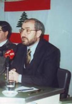 الوزير اللبناني غازي العريضي، من وزراء الحزب التقدمي الإشتراكي - نائب في البرلمان اللبناني